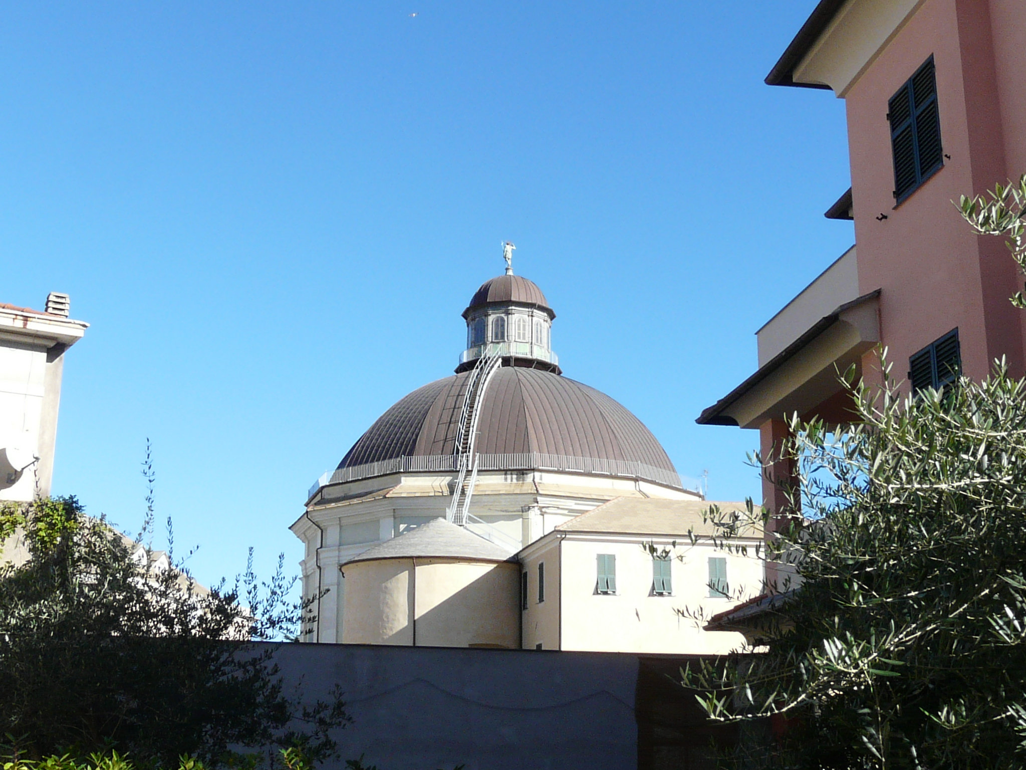 Chiesa di San Giovanni Battista, Loano, Liguria, Italia.